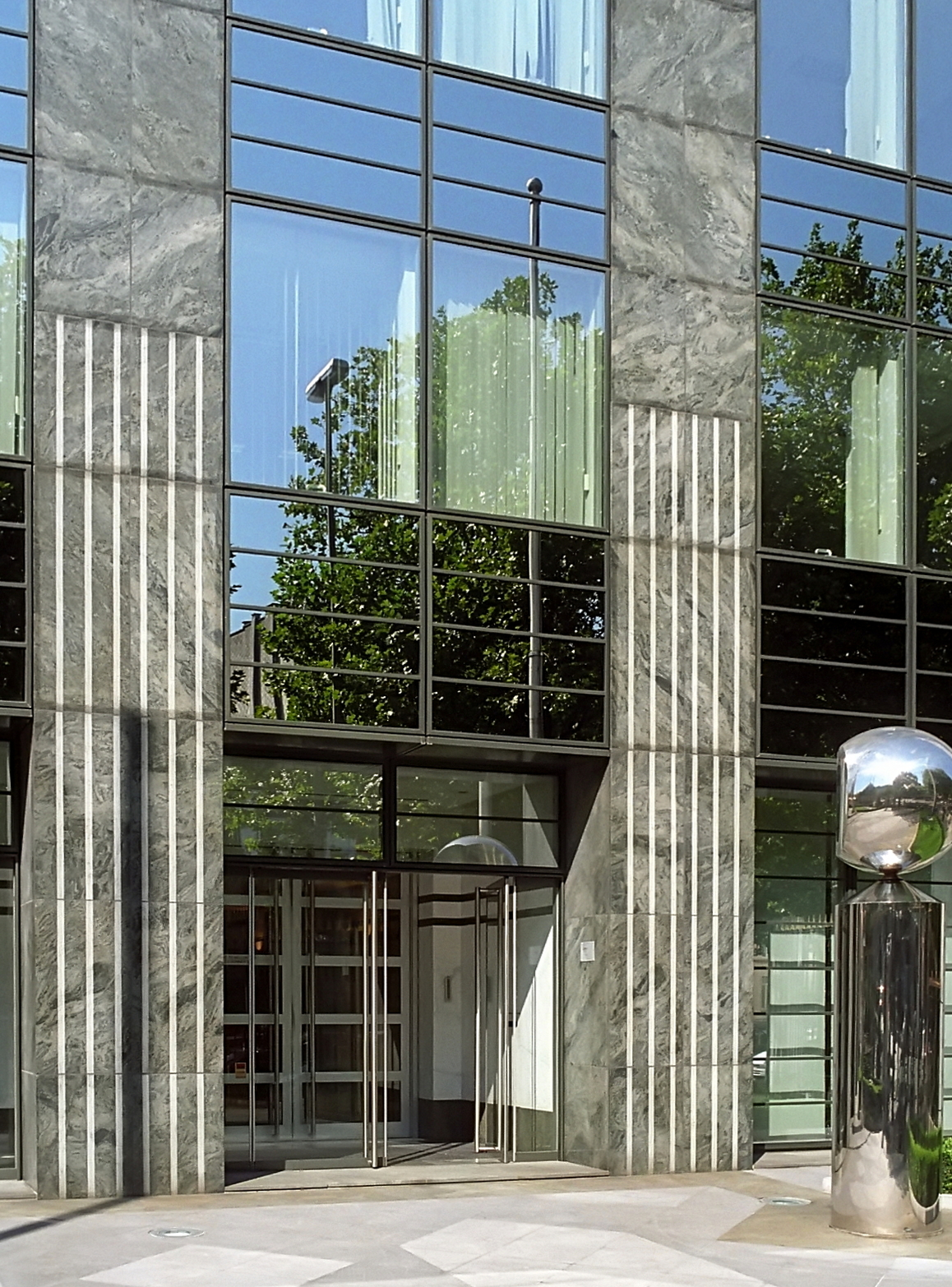 Belgique - Bruxelles - Immeuble Régent 44 (Architecture postmoderne en Belgique - Bureau d'architecture Henri Montois)